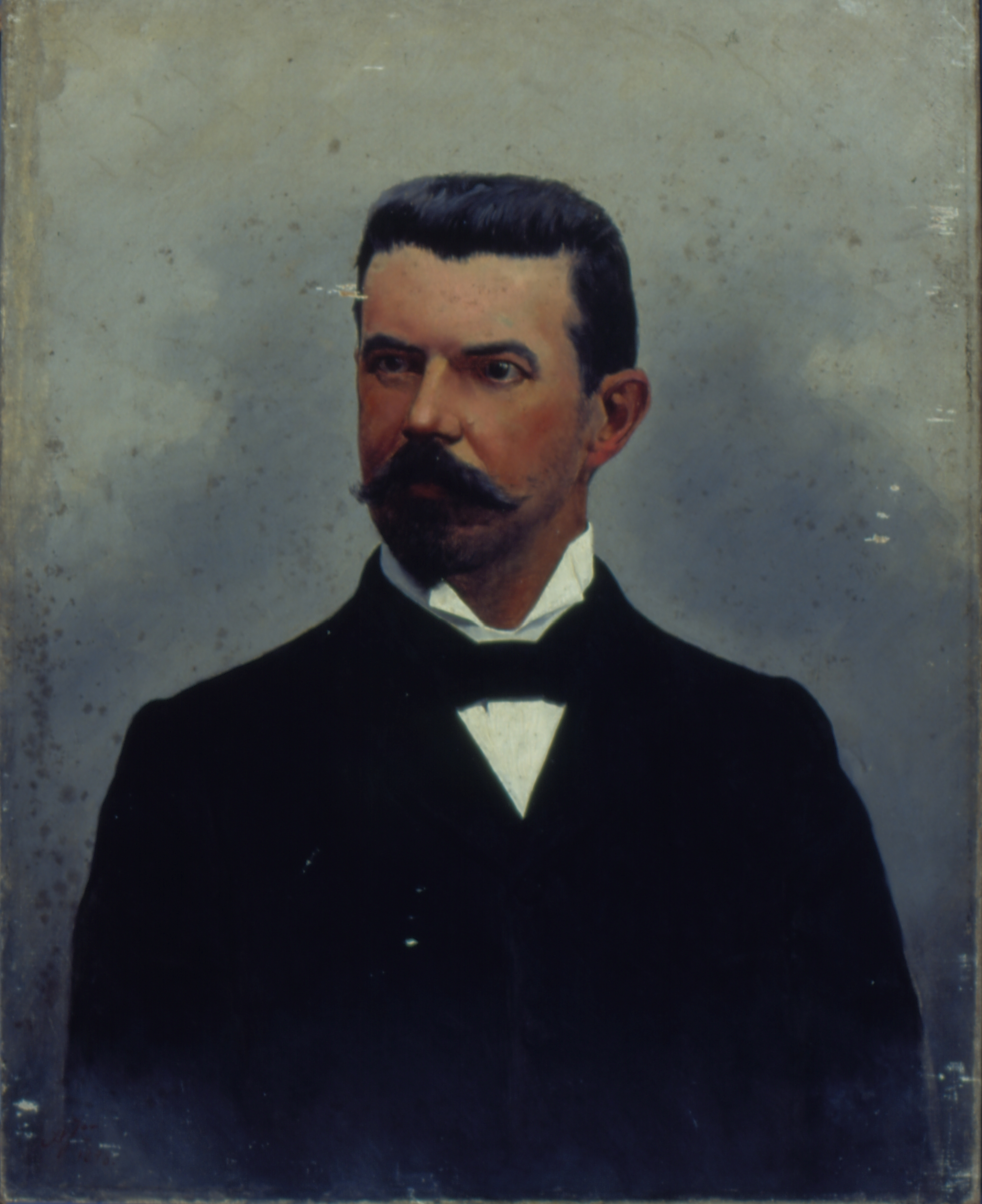 Obra que integra o acervo do Museu Paulista da USP.